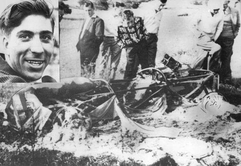 Zentralbild 25 Ge 21.6.1960 Zwei Todesopfer beim Großen Preis von Belgien Trotz der beiden Todesopfer im Großen Preis von Belgien am 19.6.1960, der beiden Engländer Bristow und Stacey, ließ die Leitung das Rennen bis zum Schluß fahren. UBz: Oben links: Stacey vor dem Rennen; rechts: Der ausgebrannte Rennwagen.